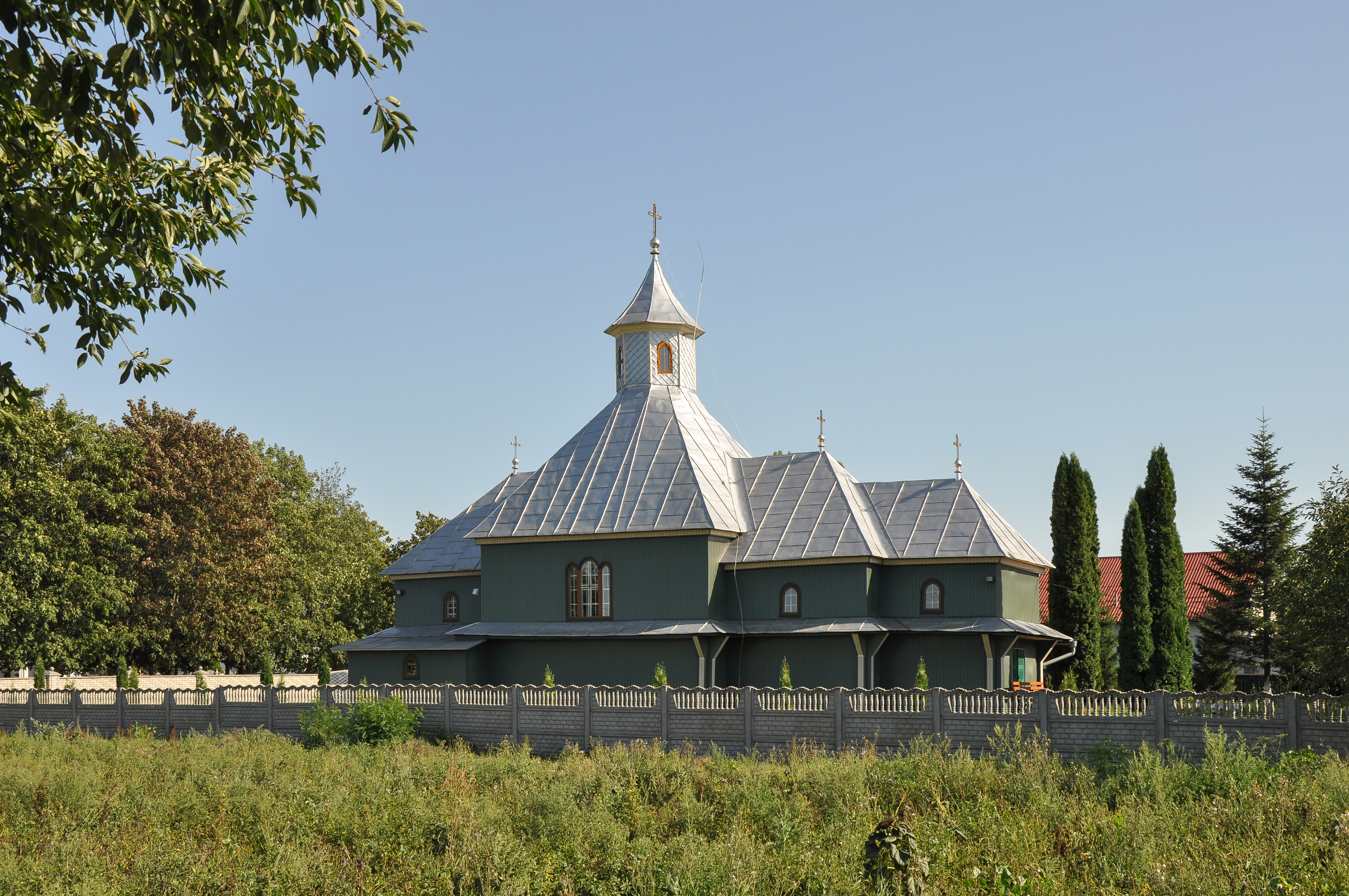 Церква Іоанна Крестителя (Іванівська церква) (дер.), с. Мамаївці